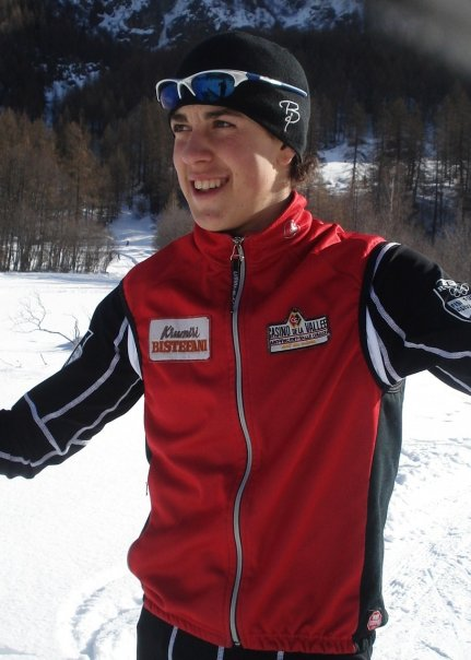 foto dell'atleta professionista federico pellegrino.